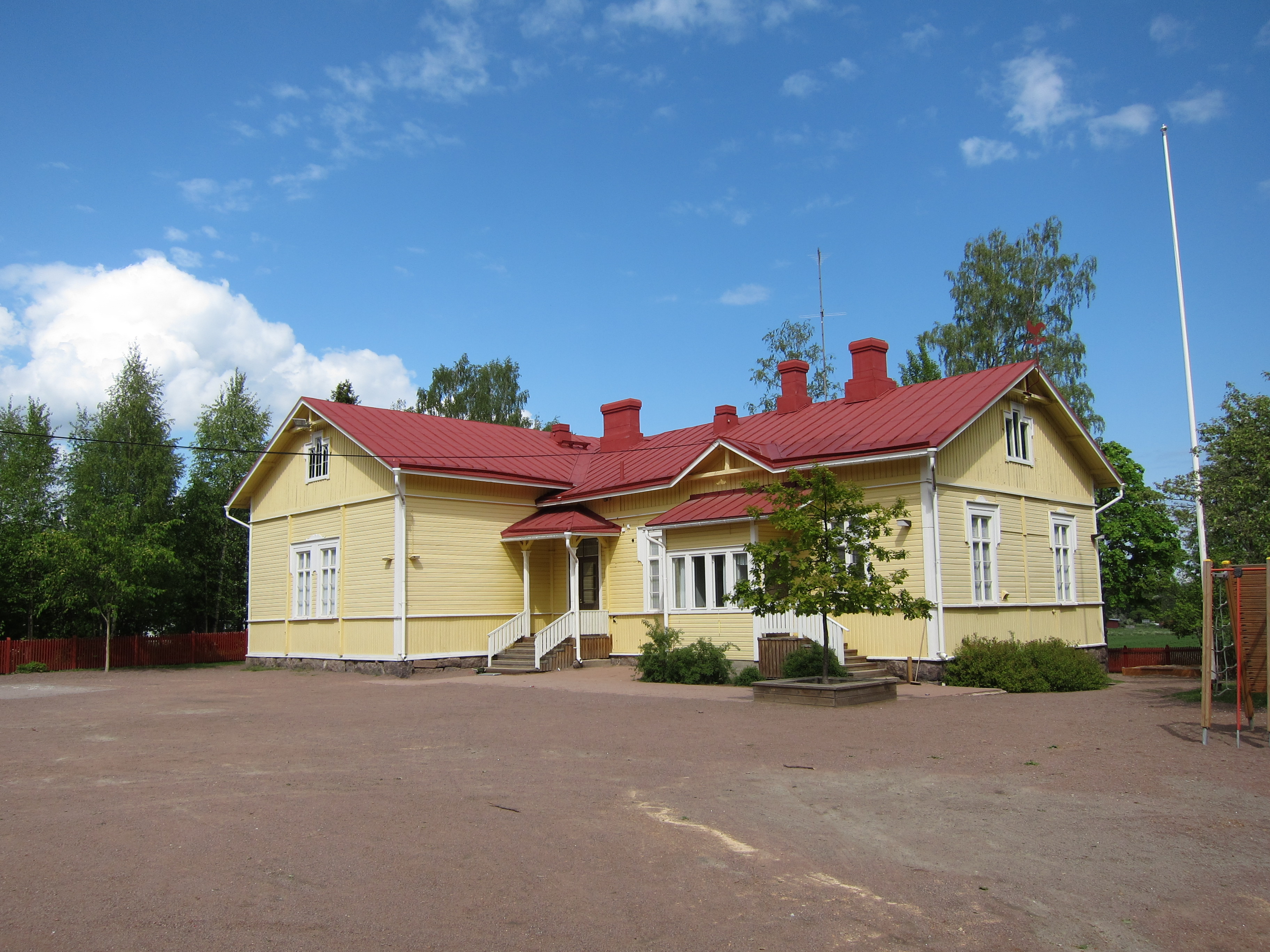 Jäppilän koulu Kotkassa.